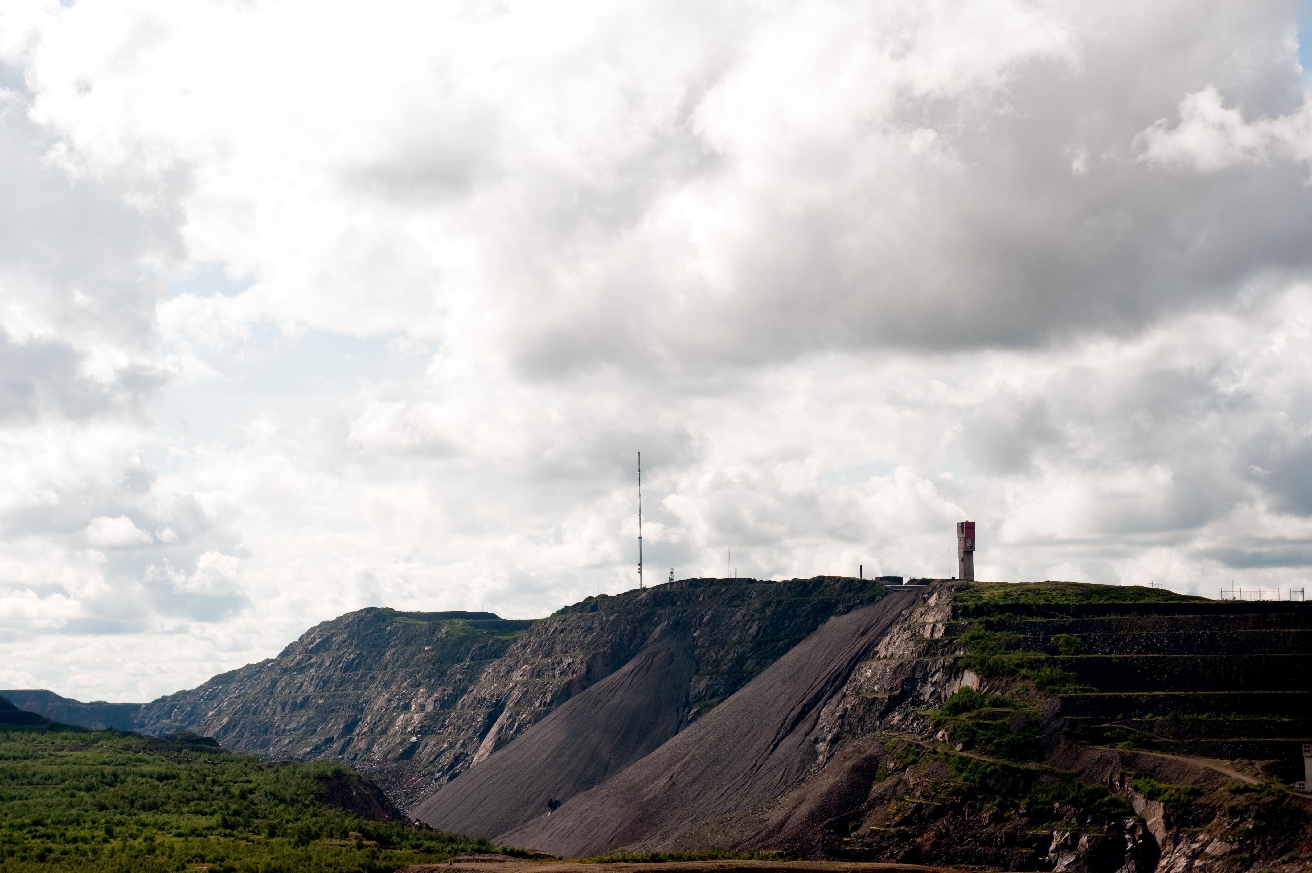 Gruvan i Kiruna Data-uid: 30f84e2e1c606a6138573d6d194b8346